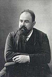 Giuseppe Giacosa, Italian writer (1847-1906)